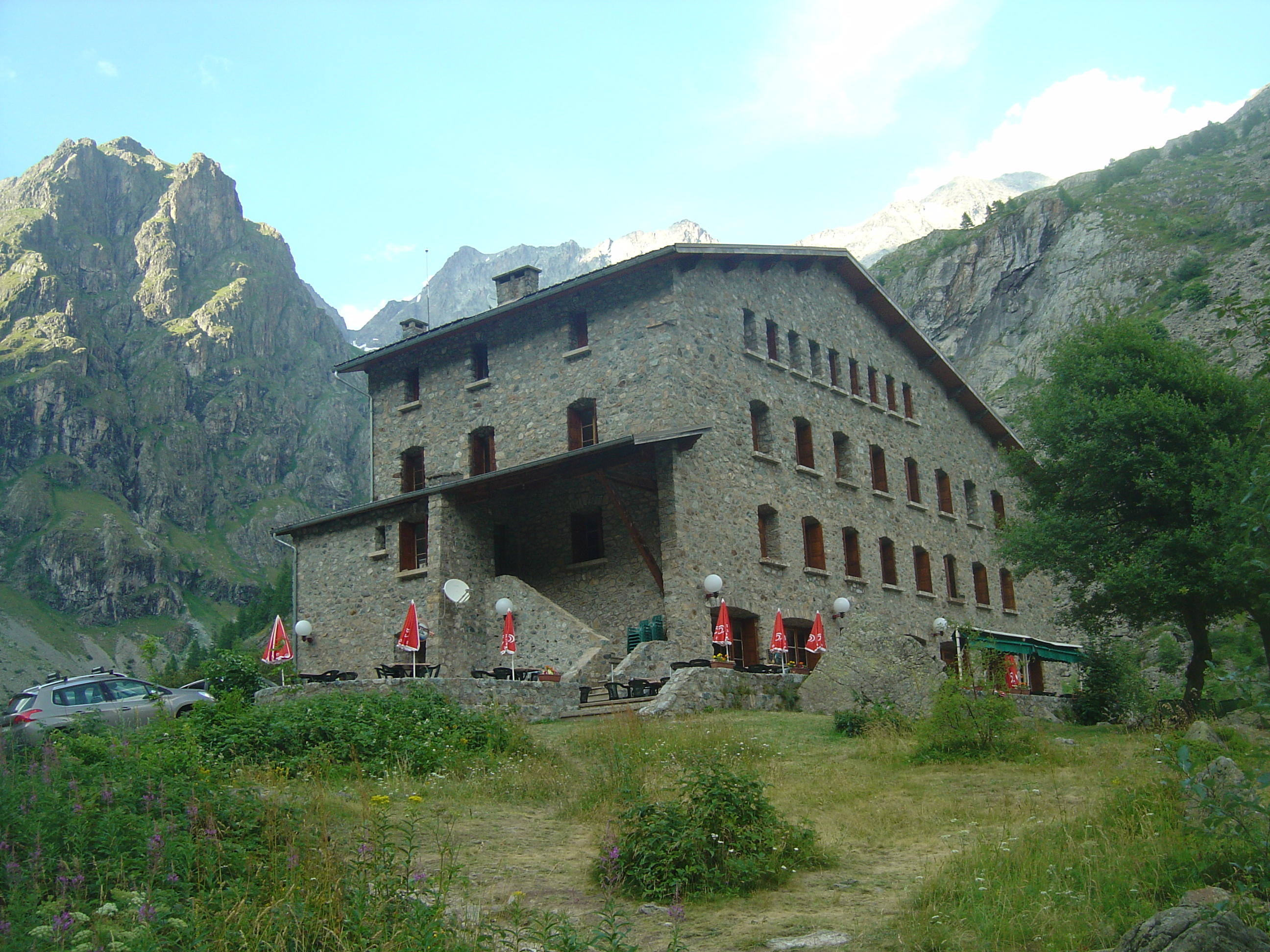 Refuge du Gioberney (1640m)